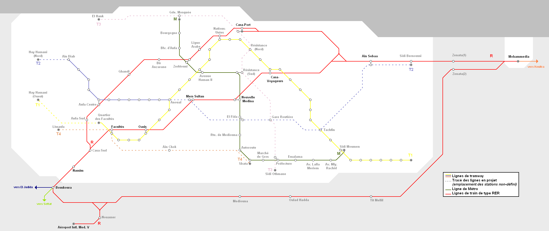 Plan des Trains, Trams et du Metro Casablanca selon le PDU et le SDAU.